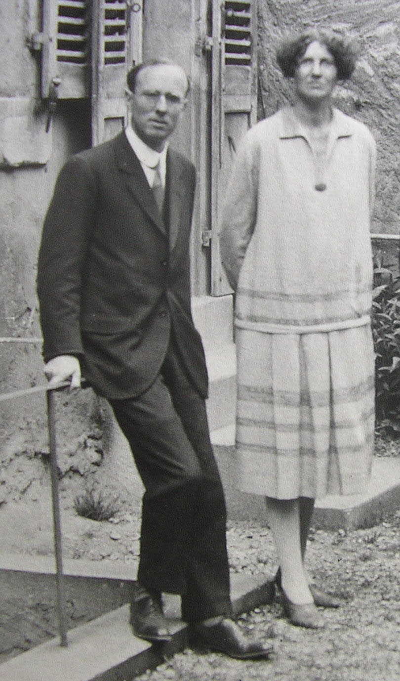 Bertram (1892-1973) et Irene (1891-1981) Pickard, secrétaires du Geneva Quaker Center de 1926 à 1948 (avec une absence pendant la guerre), dans la cour du Centre Quaker au 5 rue de la Taconnerie dans la vieille ville de Genève.